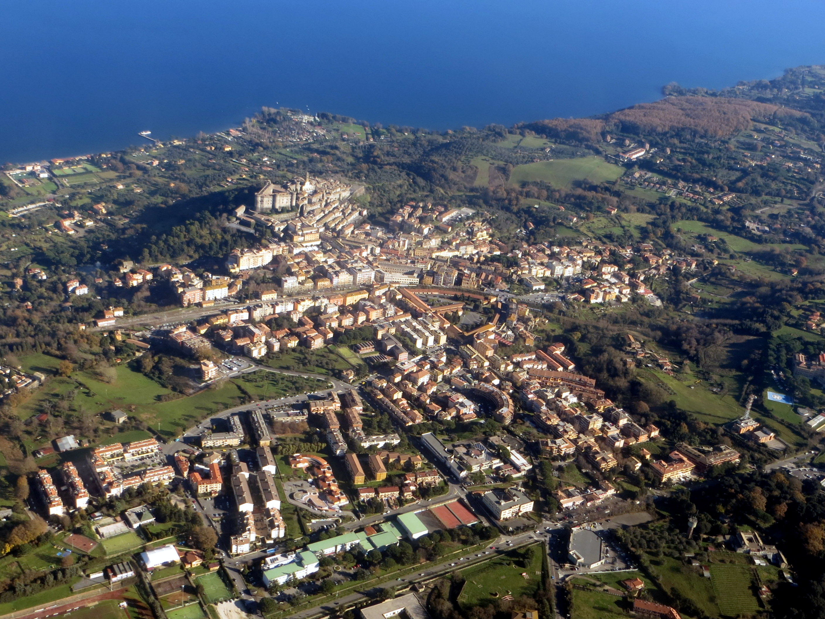 Veduta di Bracciano dall'aereo